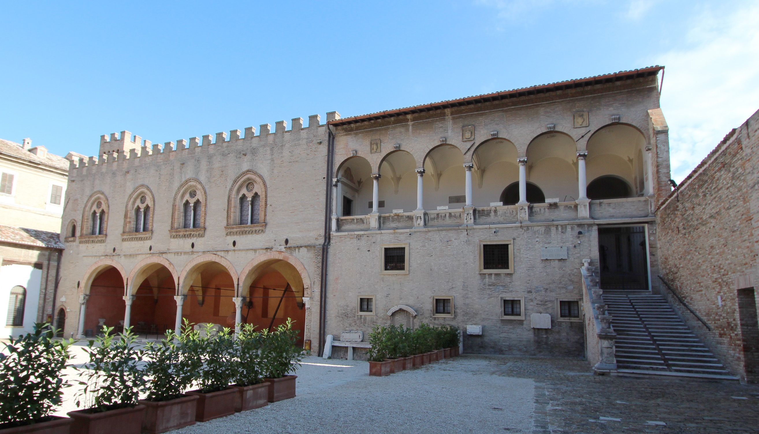 Palazzo Malatesta. Vista frontale This is a photo of a monument which is part of cultural heritage of Italy.